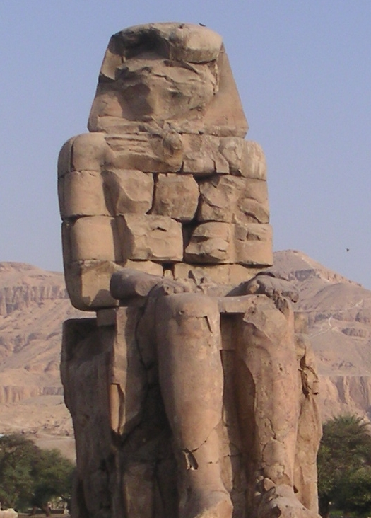 Colosses de Memnon : Colosse nord - Règne d'Amenhotep III - XVIIIe dynastie égyptienne - Kom el-Hettan - août 2005